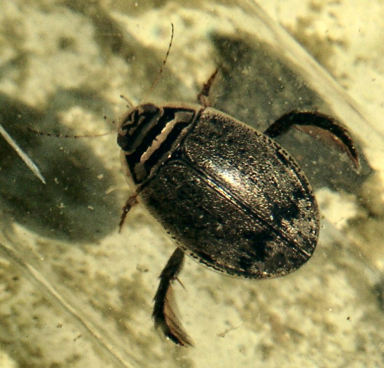 Acilius sulcatus (Gemeiner Furchenschwimmer)